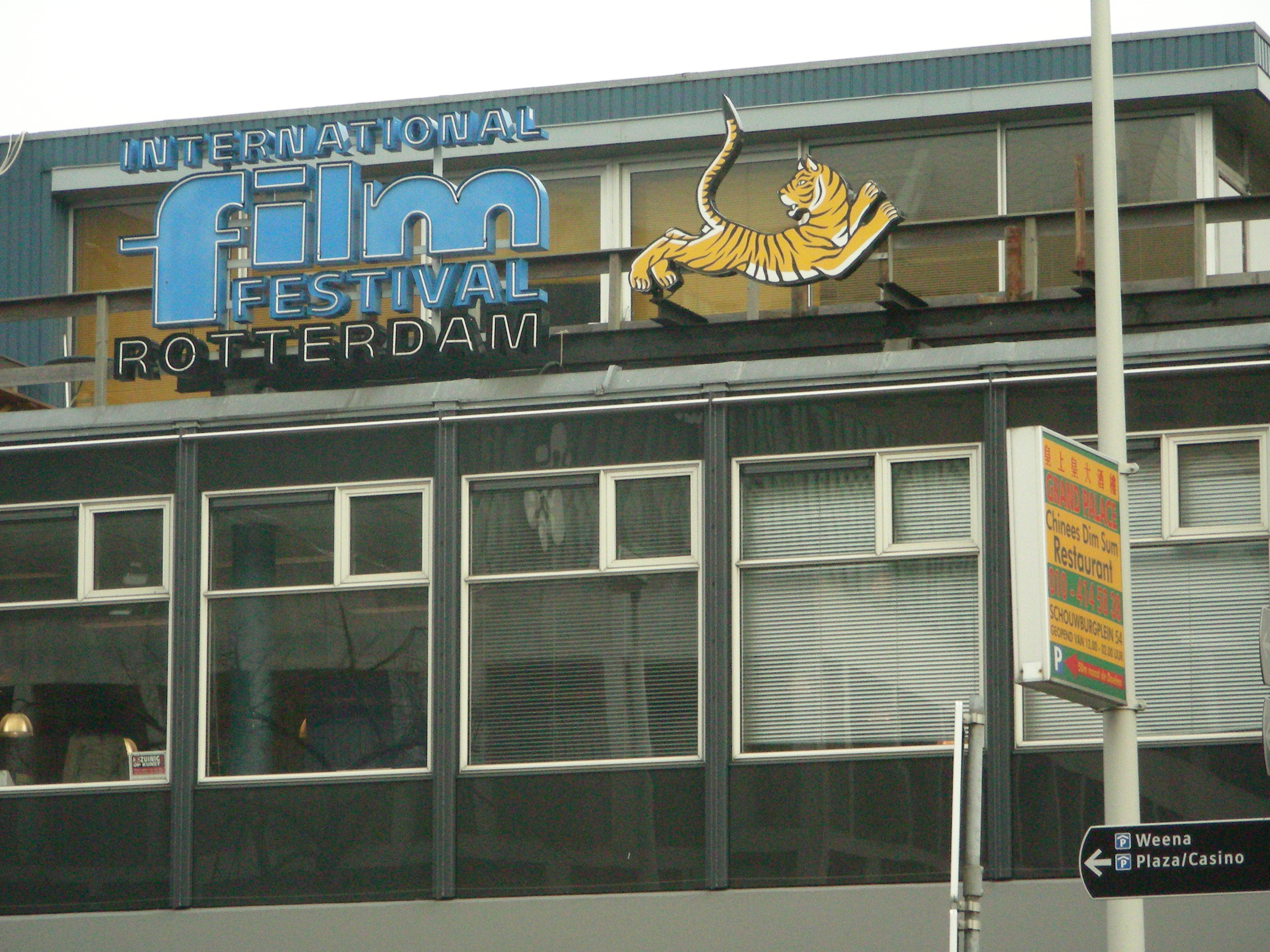 Kantoor van het IFFR te Rotterdam